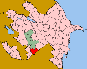 Map of Azerbaijan showing Jabrayil (Cəbrayıl) rayon.